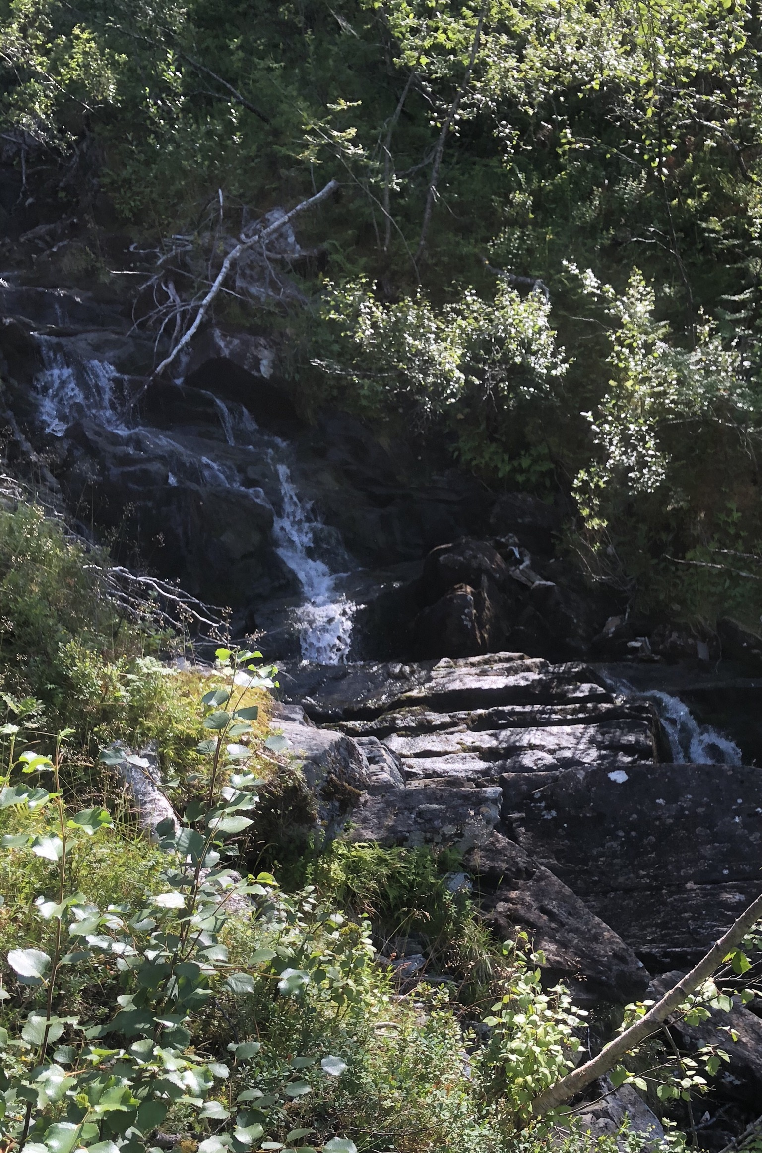 Kvernhuselva